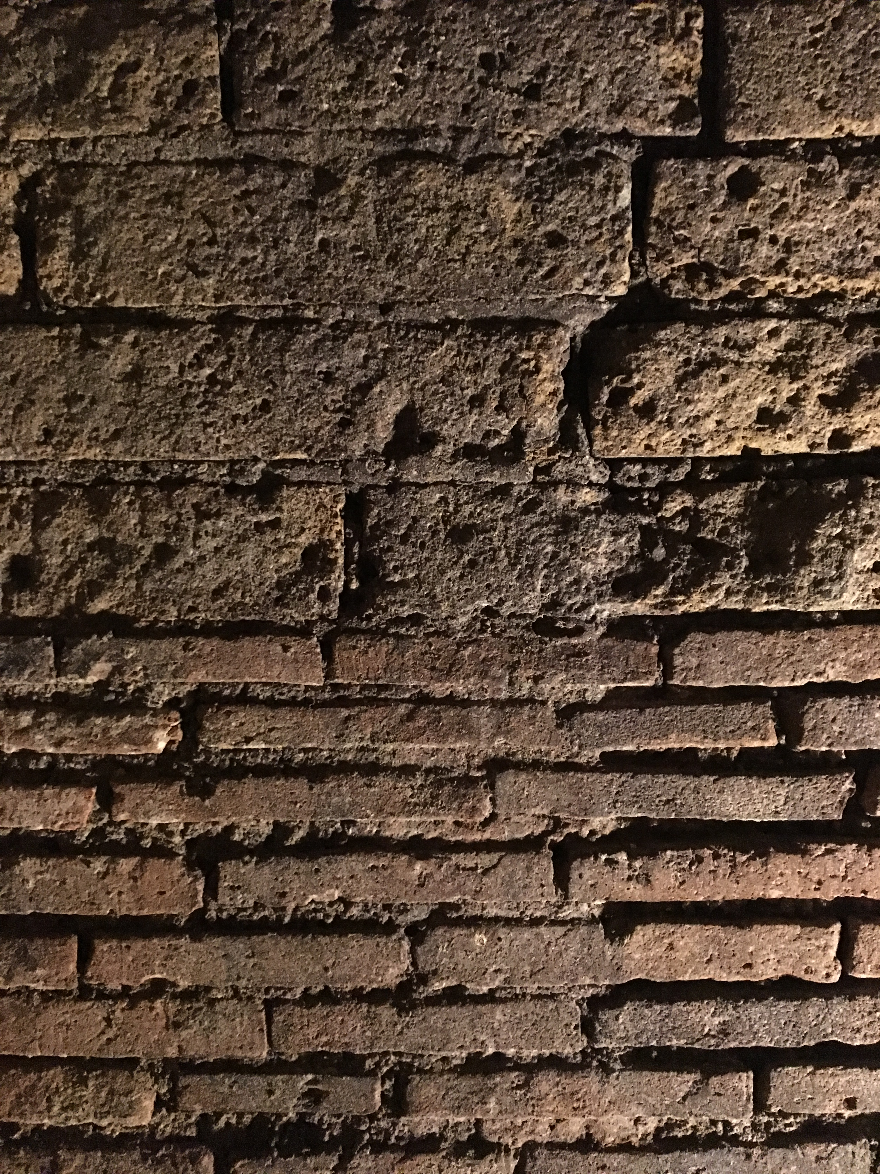 Le diverse stratificazioni mostrano diversi approcci alla costruzione dell'acquedotto Augusteo del Serino.